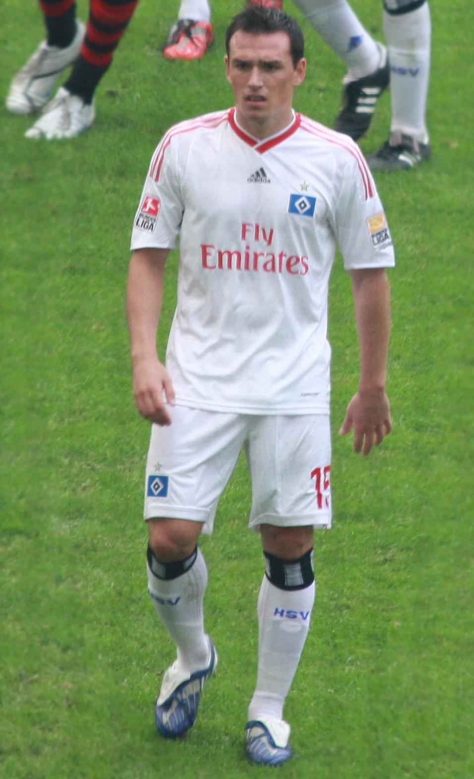 Piotr Troschowski (HSV) im Bundesligaspiel Eintracht Frankfurt gegen Hamburger SV in der Saison 2009-2010